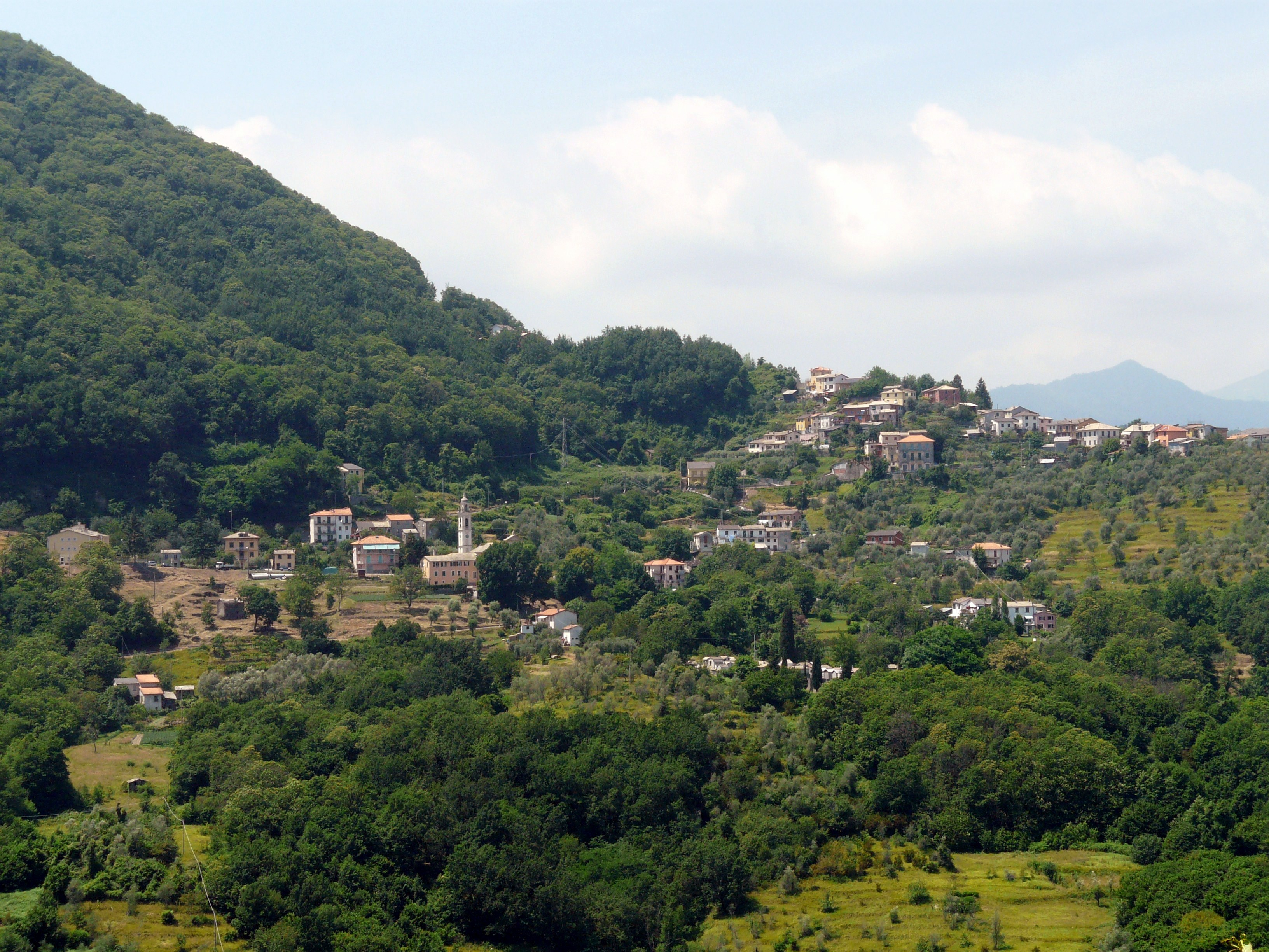 Panorama di Tribogna da Serra di Cicagna, Liguria, Italia